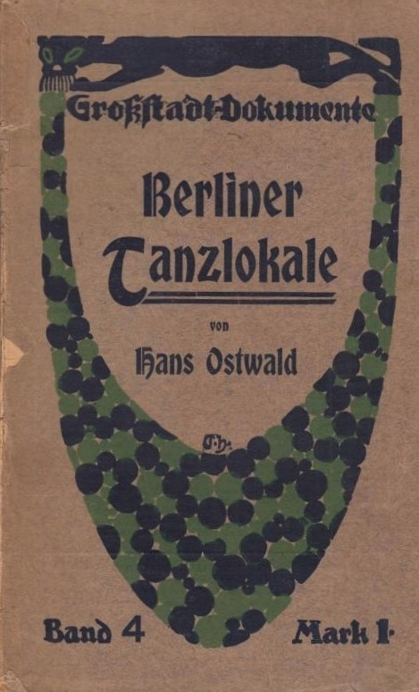 Hans Ostwald: Berliner Tanzlokale. Berlin: Hermann Seemann Nachfolger, 1904 Großstadt-Dokumente Band 4, hrsg. von Hans Ostwald